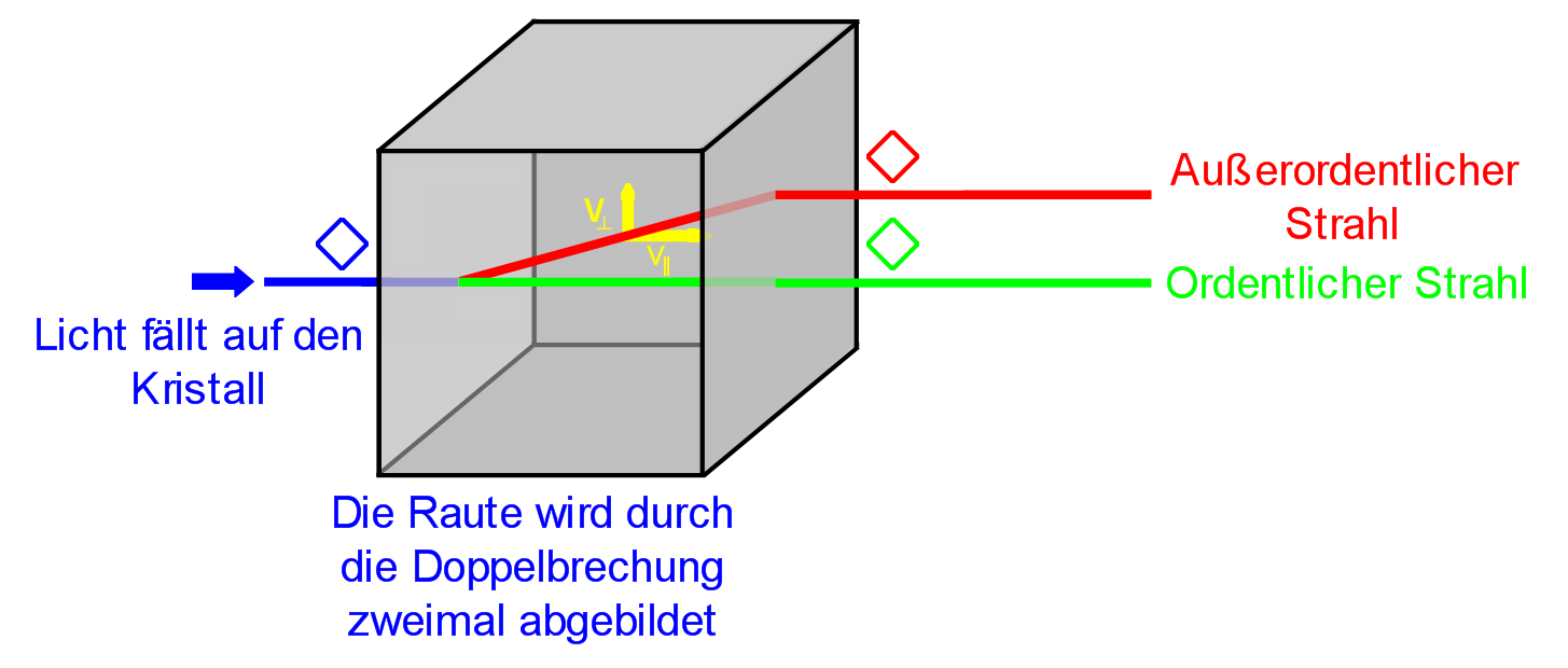 Doppelbrechung eines Lichtstrahls im Kristall